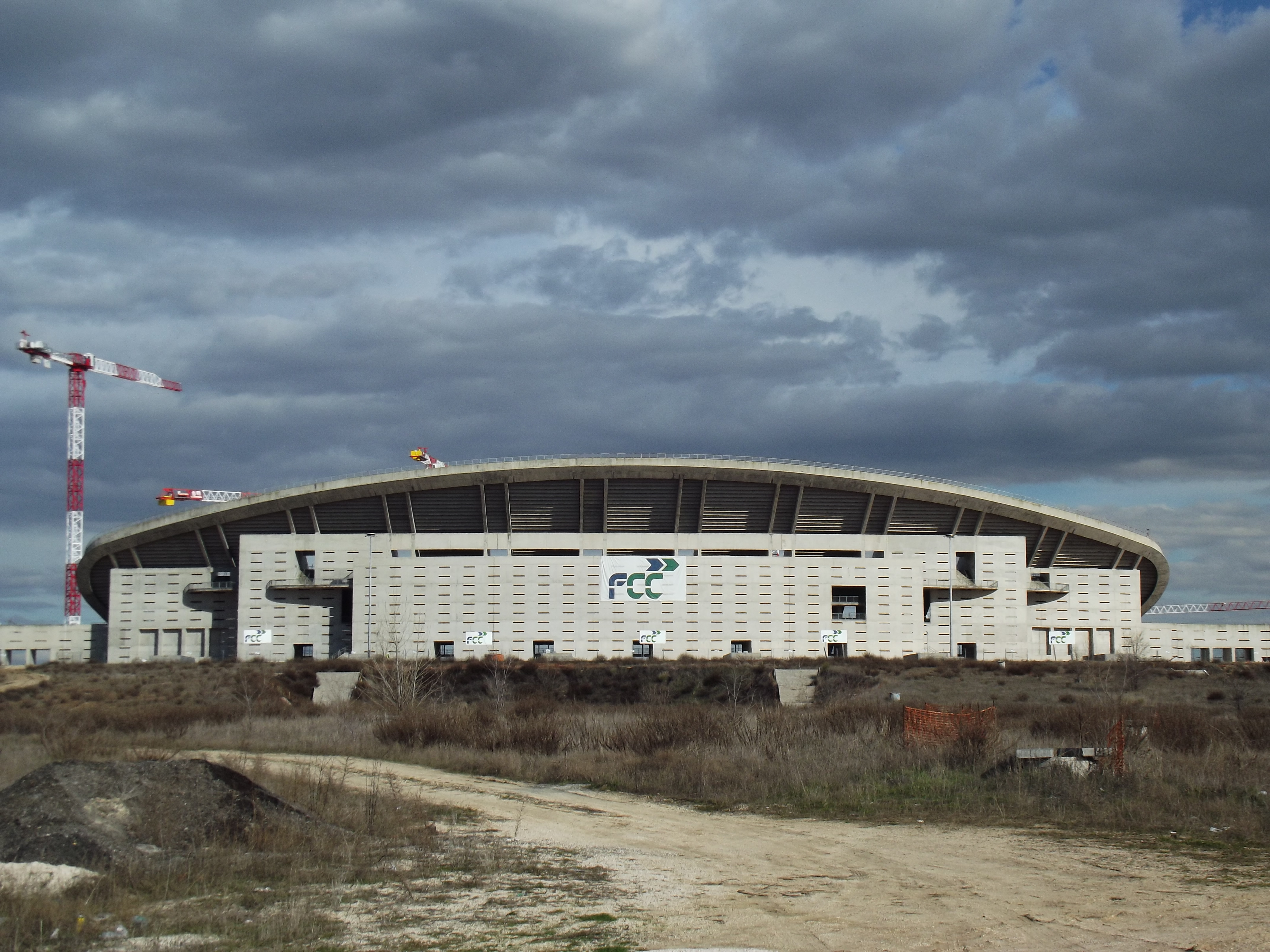 Estadio de La Peineta (February 2014)